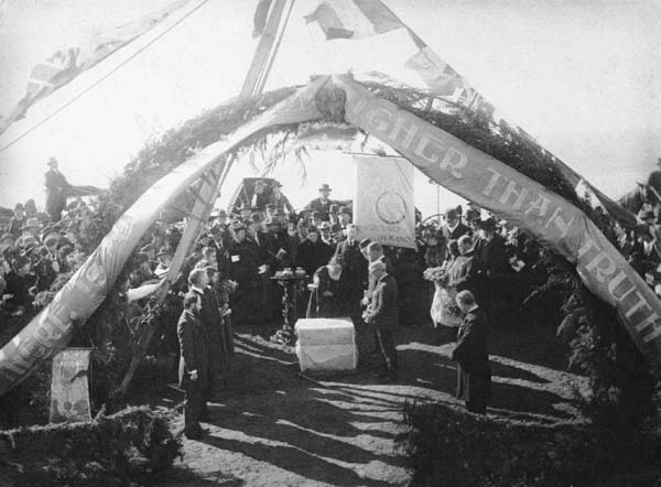 Grundsteinlegung für die "School for the Revival of the Lost Mysteries of Antiquity" auf Lomaland, San Diego, Kalifornien am 23. Februar 1897. Lomaland gehörte zur Theosophischen Gesellschaft in Amerika (Theosophische Gesellschaft Point Loma).